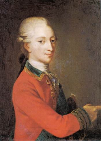 Christian VII.